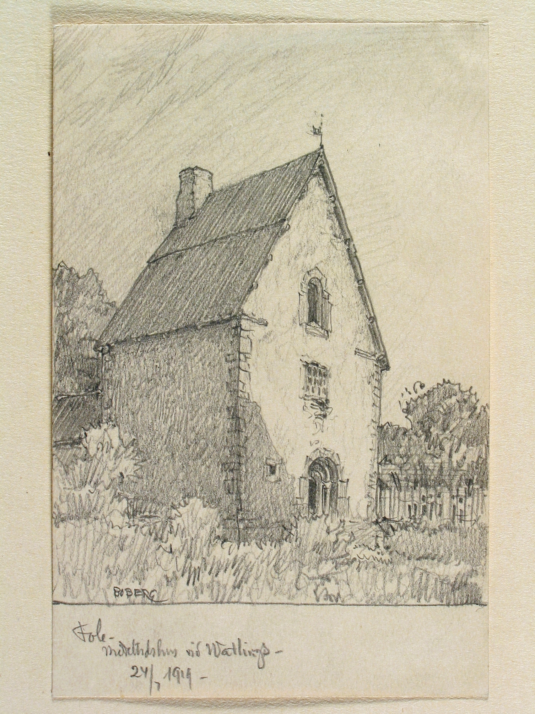 Gotland, Fole sn., Vatlings. Medeltida stenhus. Teckning av Ferdinand Boberg Depicted place: Fole sn., Vatlings (Ortnamn därutöver), Gotland County (Q103738)